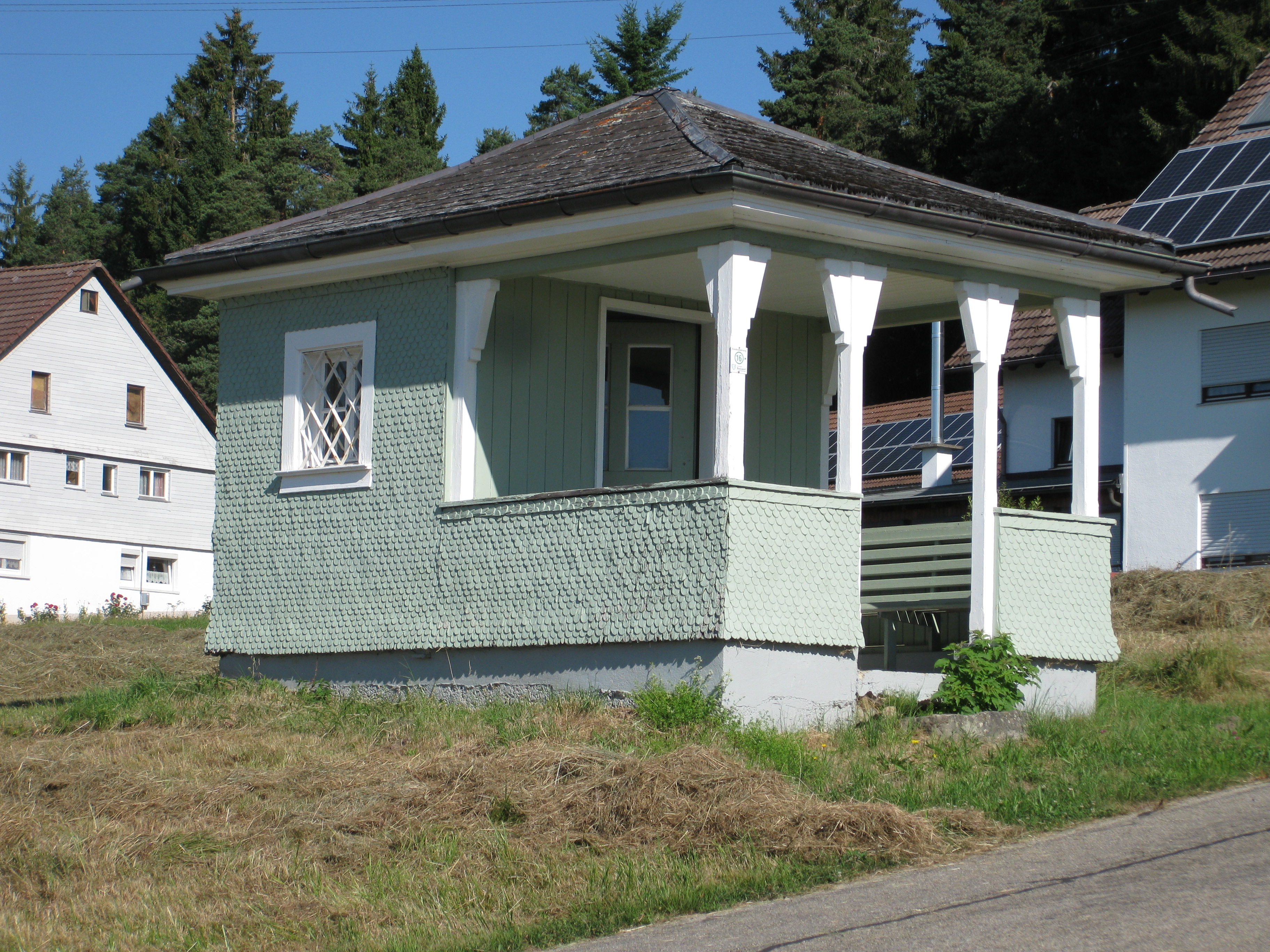 Vorbau der einstigen St. Anna Kapelle in Ebnet (Stadtteil von Bonndorf). Die Kapelle stand früher unterhalb der heutigen Kapelle. Mit dem Bau der neuen Kapelle wurde die alte Kapelle abgerissen und deren Vorbau über dem Ort als Bushaltestelle aufgestellt.